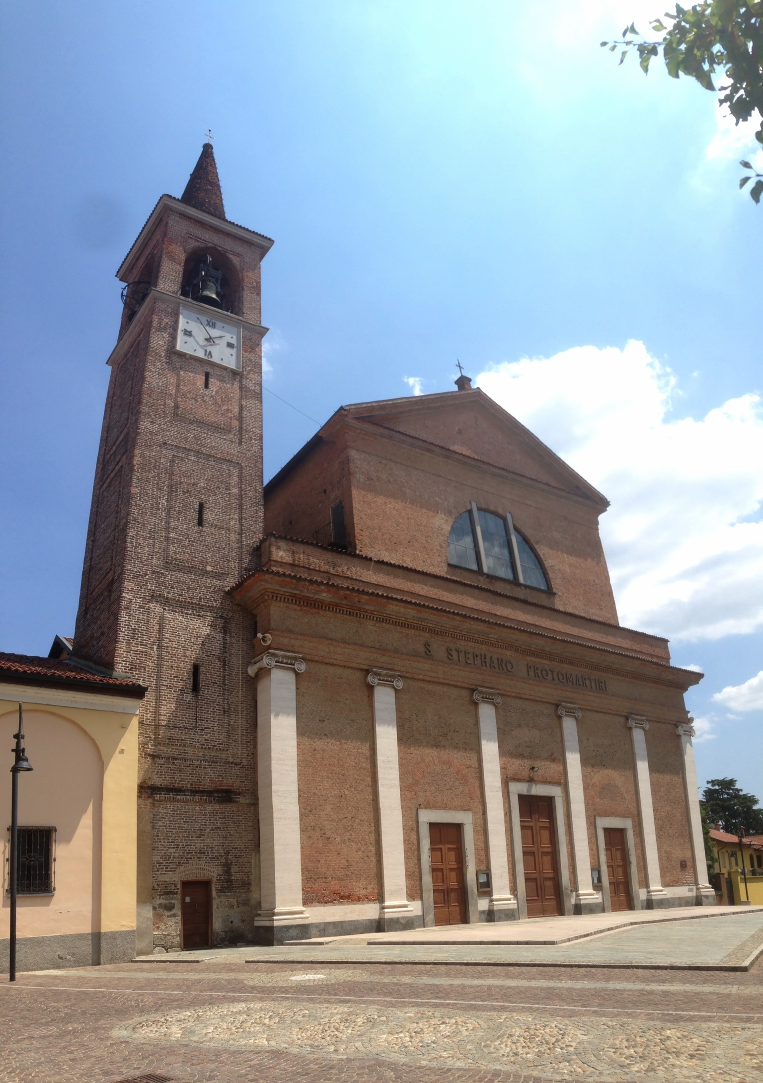 Nerviano - Parrocchia di Santo Stefano Protomartiri